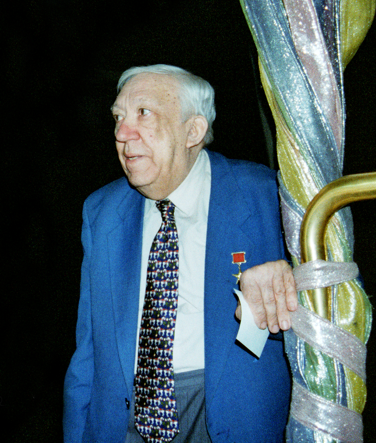 Юрий Никулин